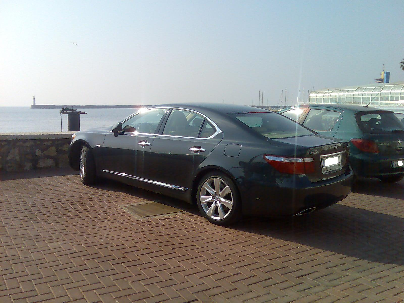 Lexus LS600hybrid